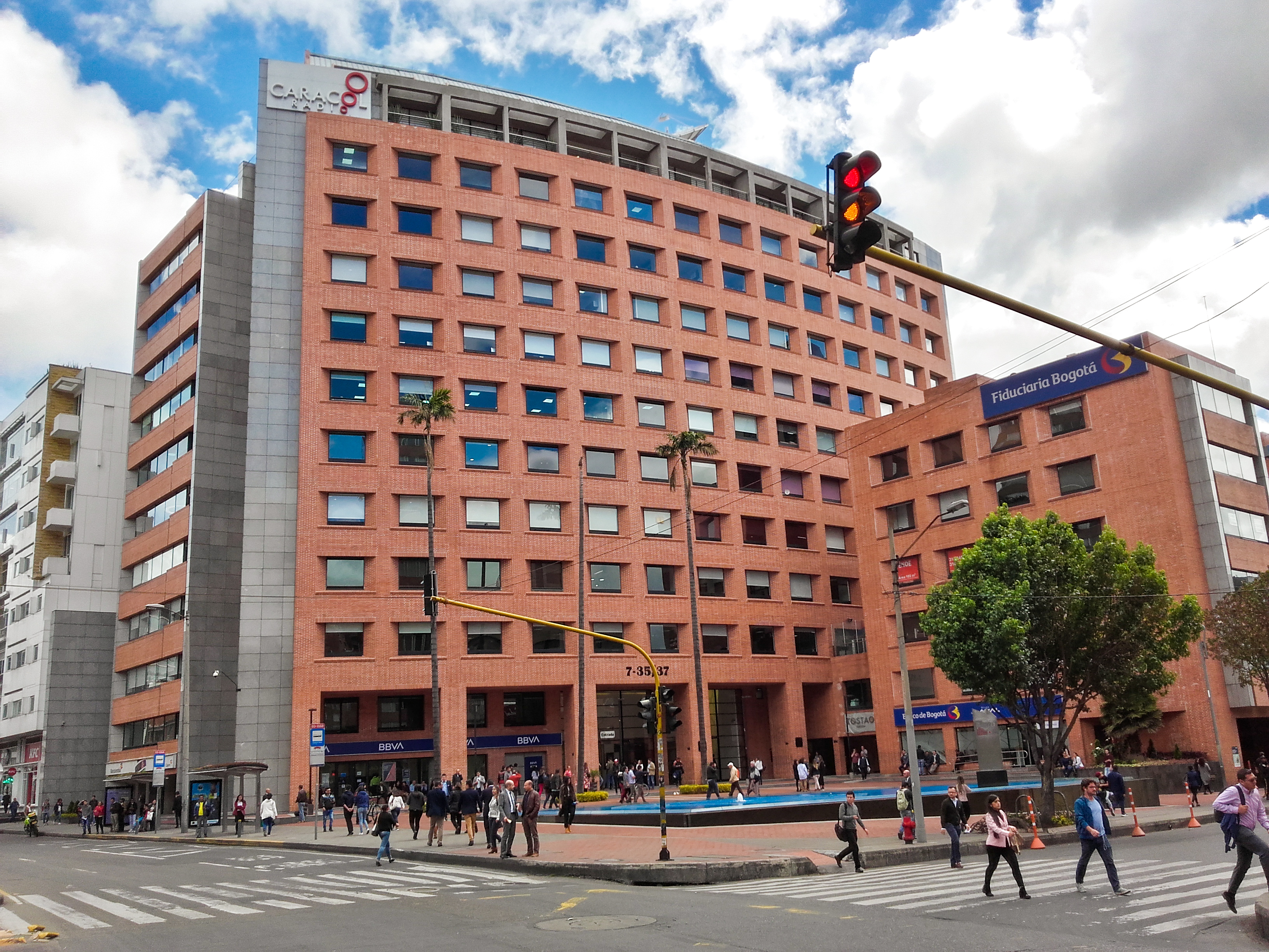 dnnfnfnfv